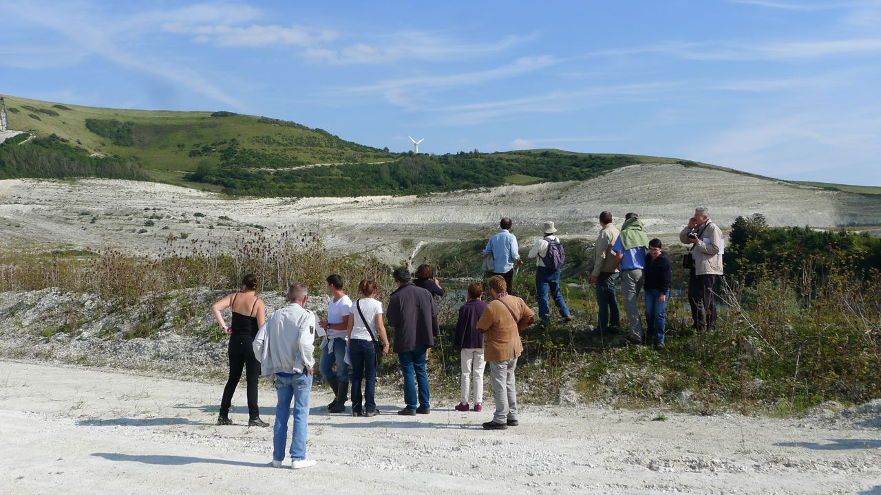 Carrière de Dannes, Boulonnais, 2015